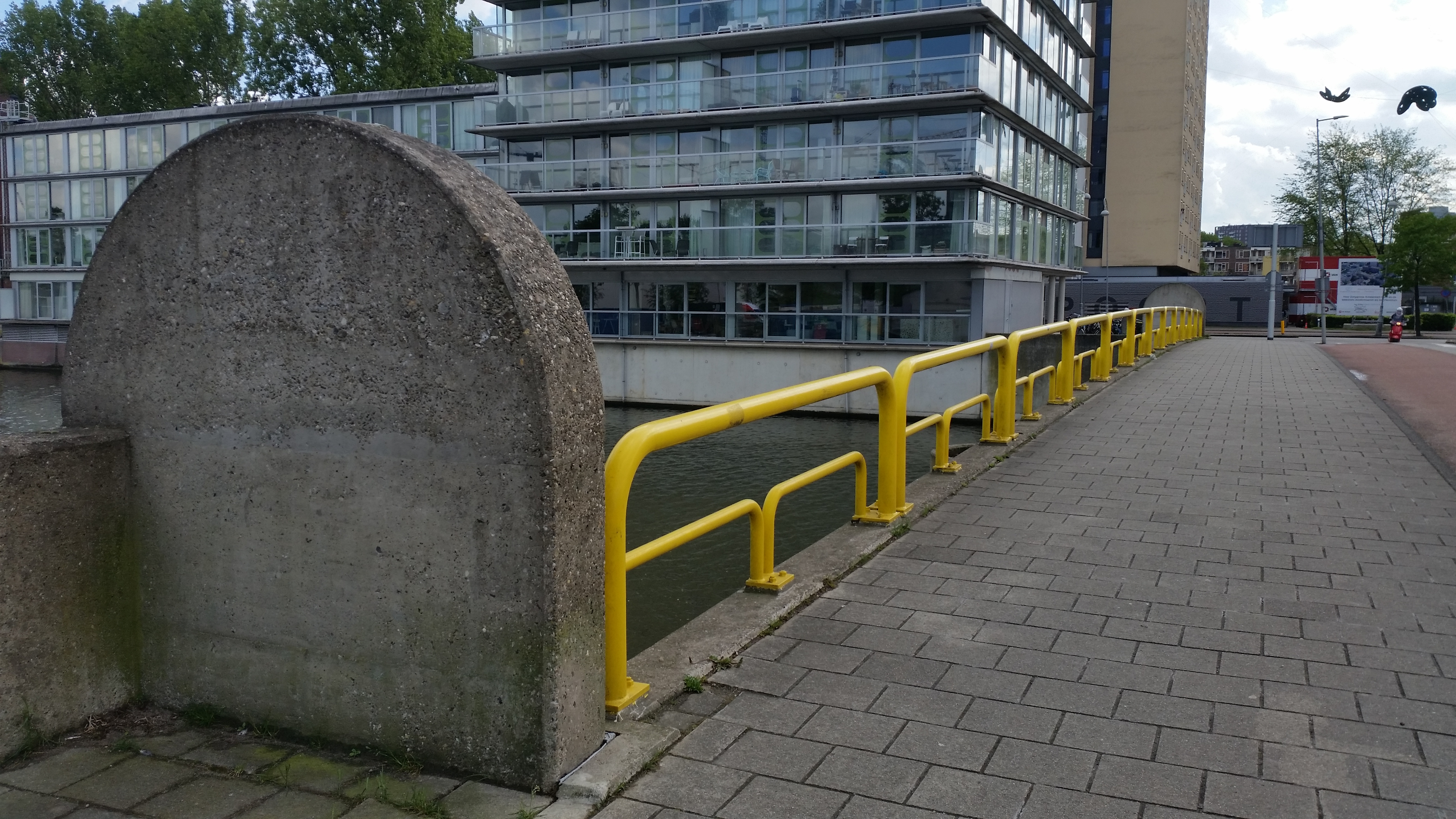 Impressie van Brug 1916 nadat zij in april 2020 haar naam had gekregen Johan Rädeckerbrug, Amsterdam-Centrum